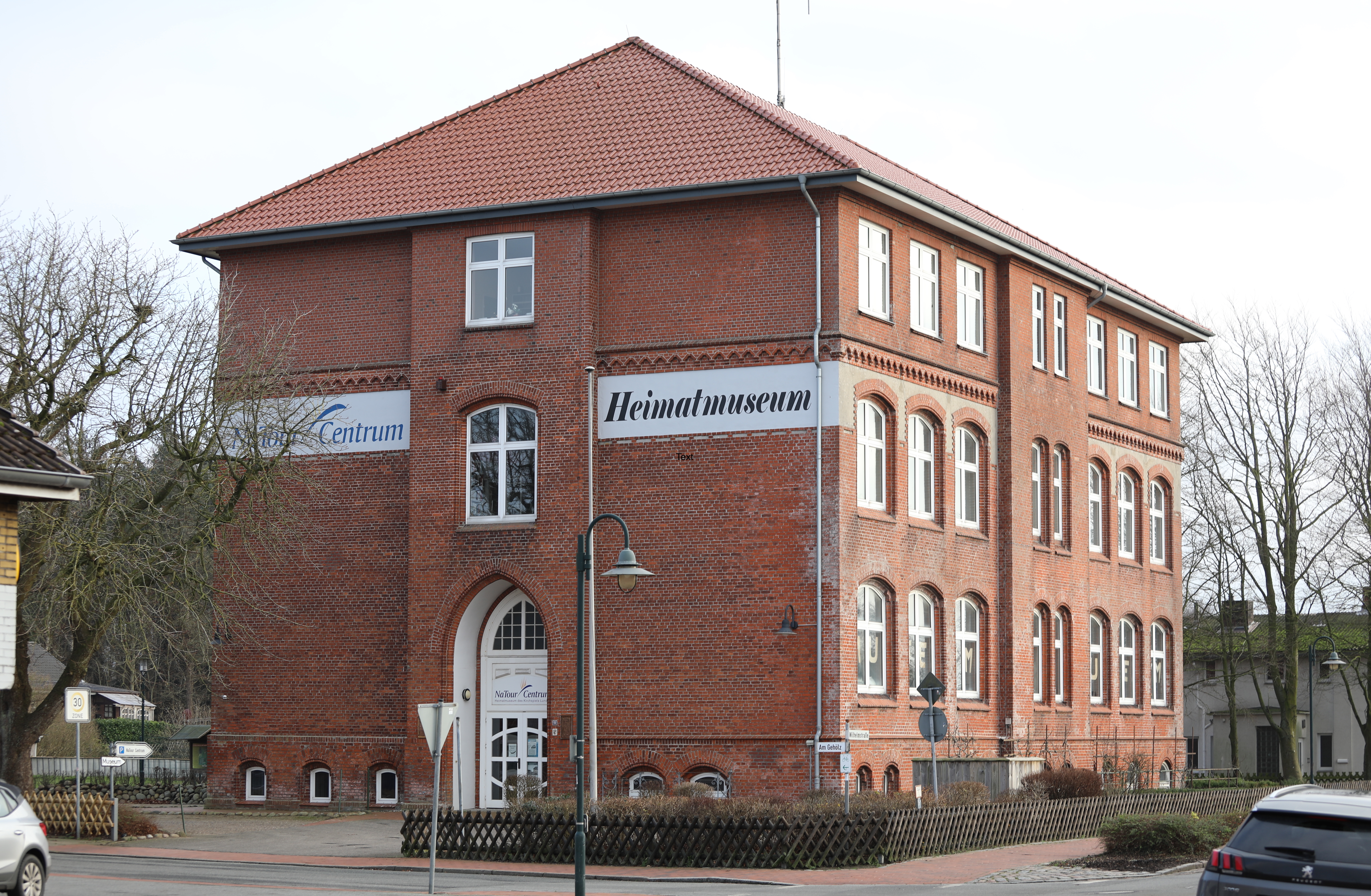 NaNaTourCentrum und Heimatmuseum in Lunden